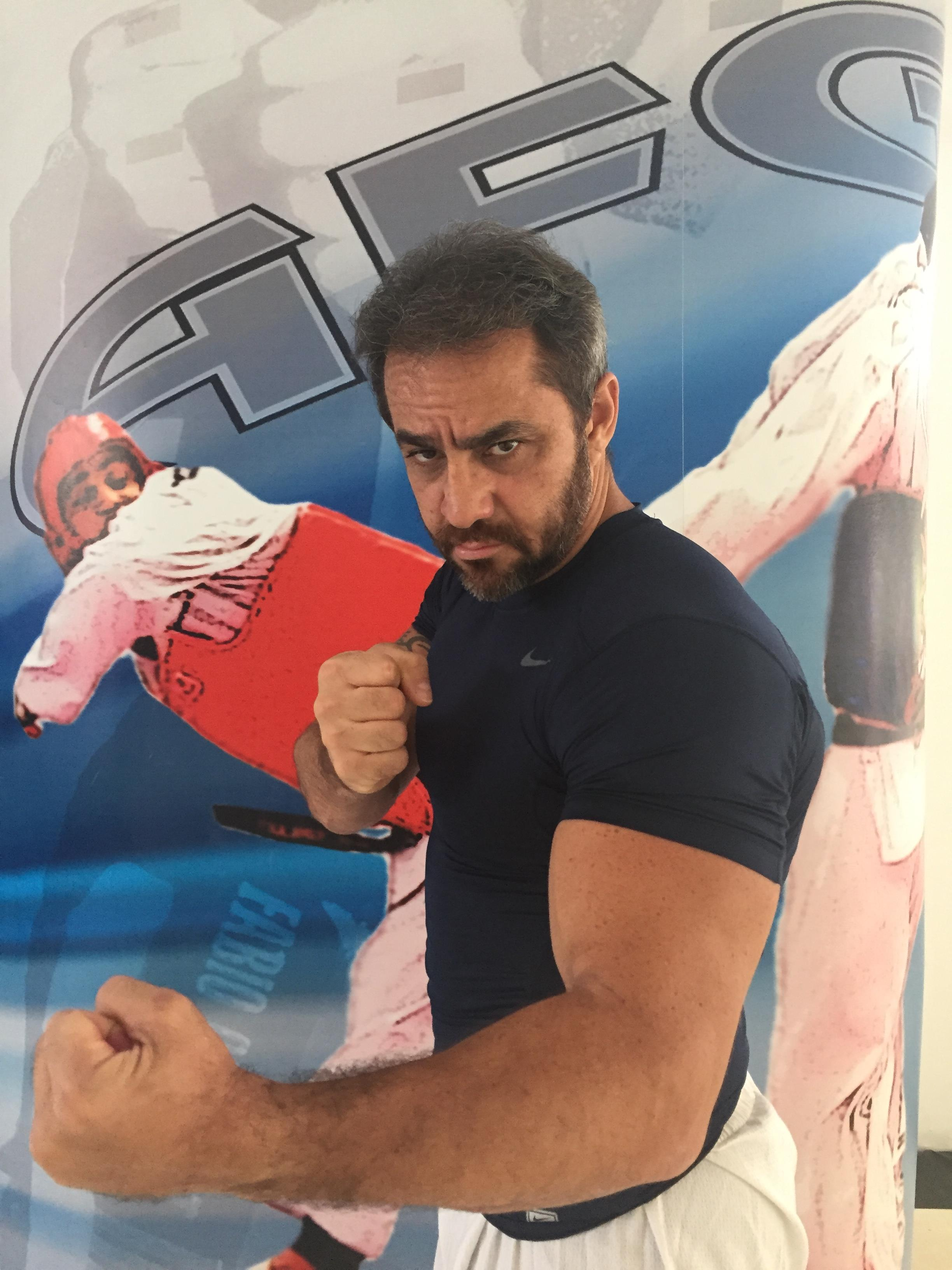 Foto tirada na AFG, Academia Fábio Goulart de Taekwondo